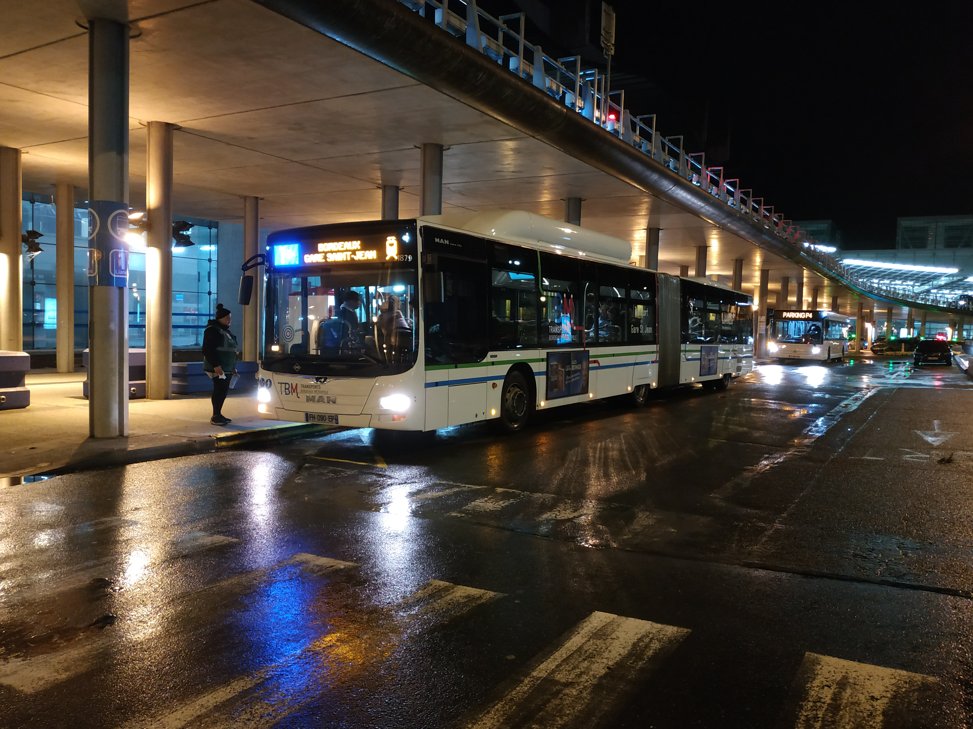 MAN Lion's City sur la ligne pour la navette aéroport de Bordeaux Merignac